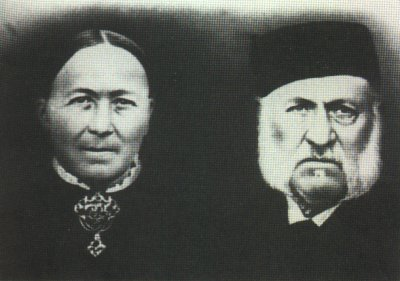 Der Musiker Hubertus Kilian mit seiner Frau Phillipine